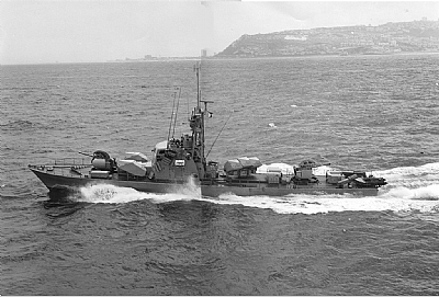 הספינה אח"י מבטח לאחר שהותקנה בה מערכת נשק גבריאל